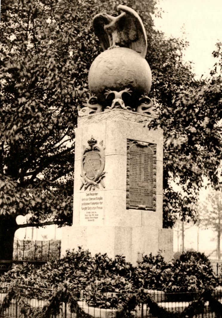 Ansichtskarte: Dresden, Kolonialkriegerdenkmal 1913